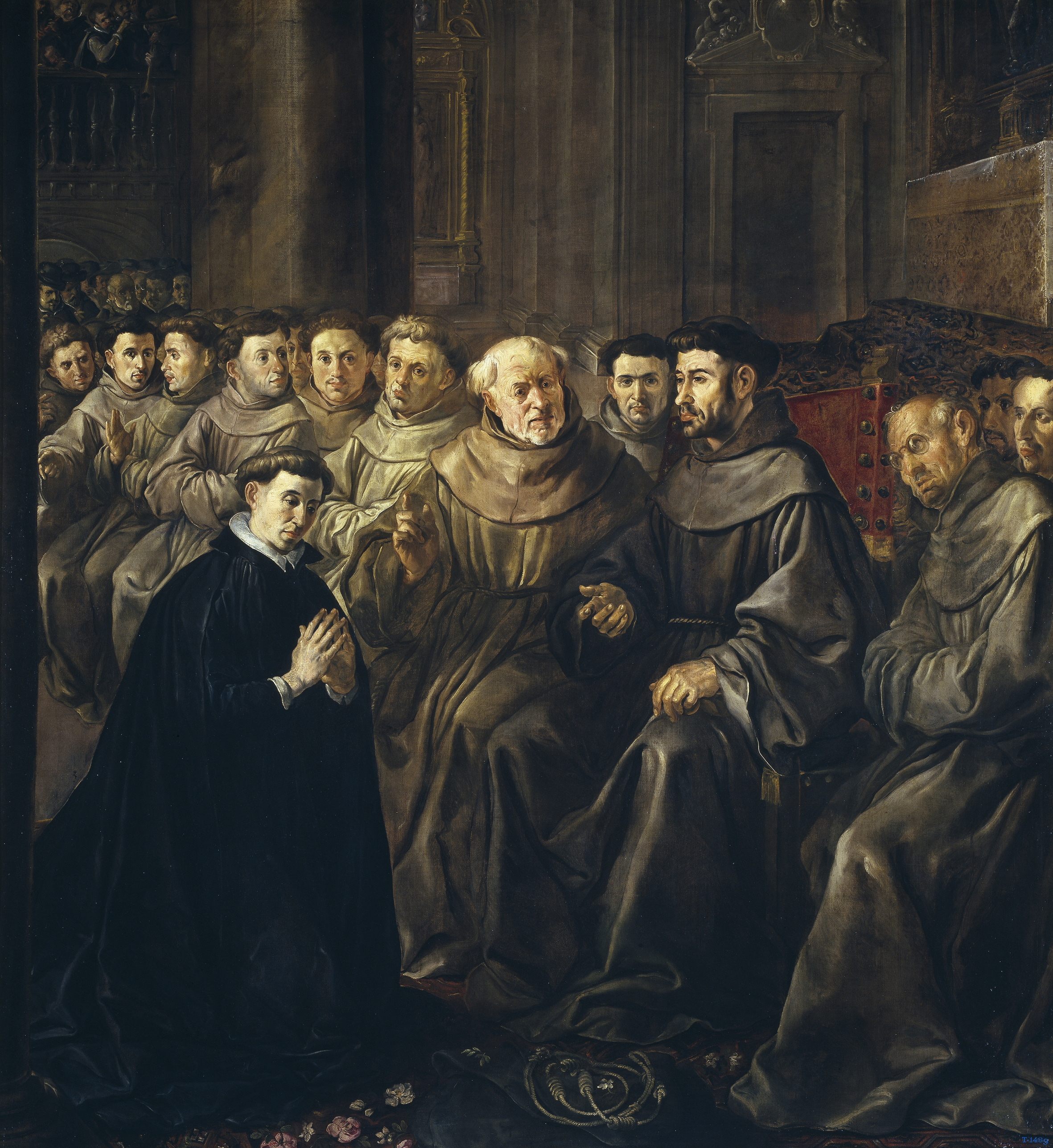 La obra representa al místico italiano San Buenaventura (1218-1274), que llegó a ser obispo de Albano y cardenal de la Iglesia Católica, recibiendo el hábito de fraile de la Orden de San Francisco